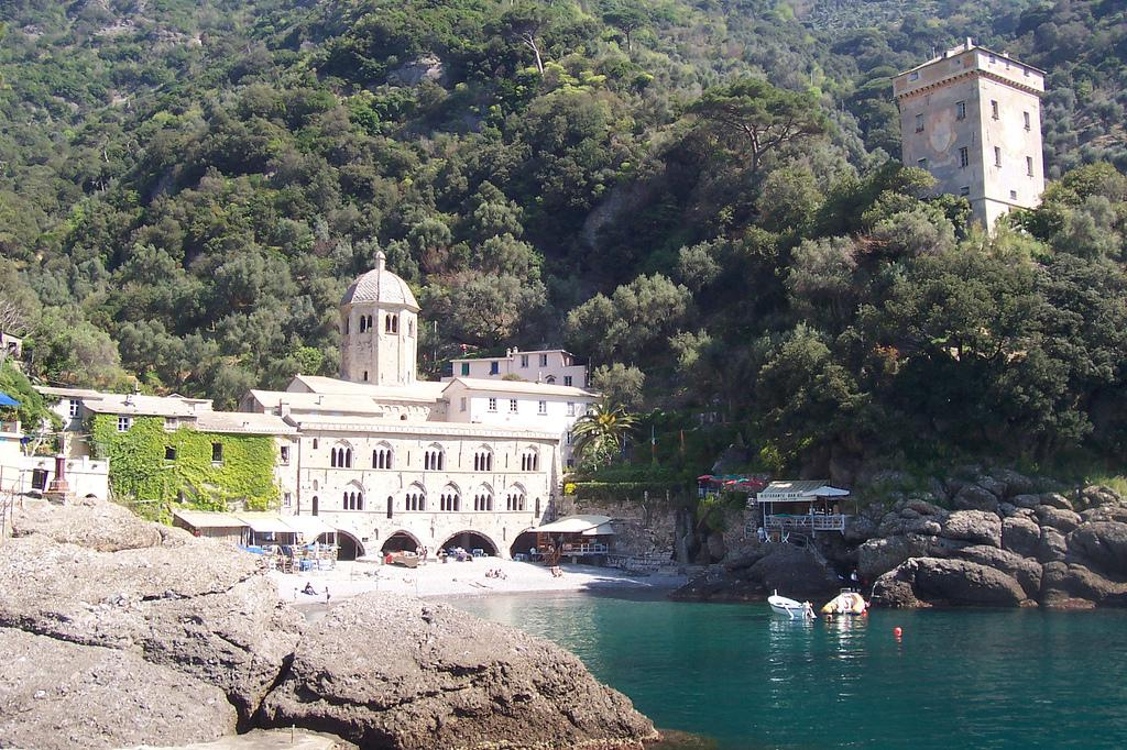 Abbazia di San Fruttuoso, Liguria, Italia